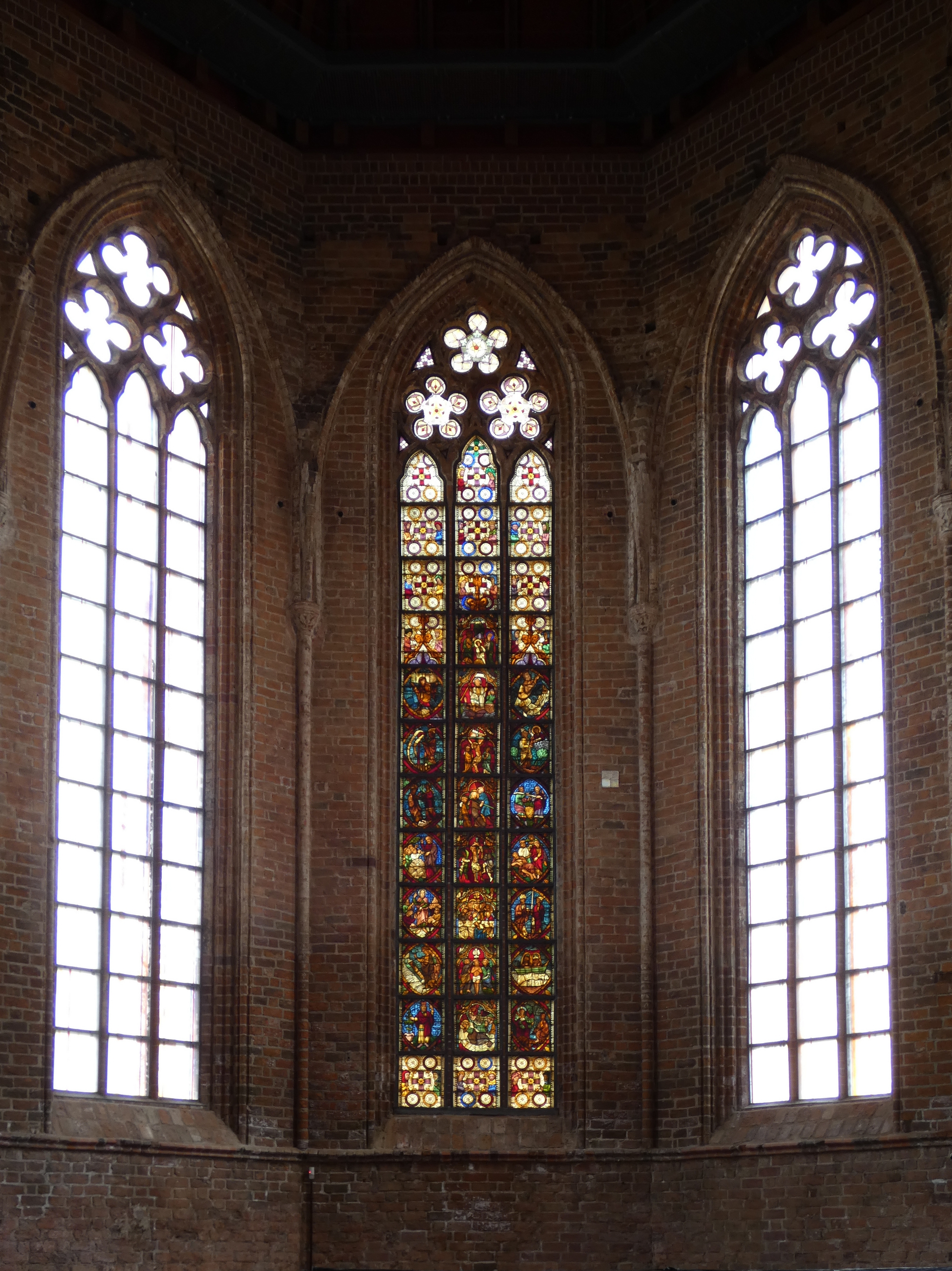 Fenster Kloster St Pauli Brandenburg